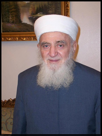 صورة الشيخ وهبي غاوجي